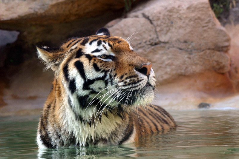 Tiger in water